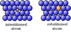 Puntvormige roosterfouten.